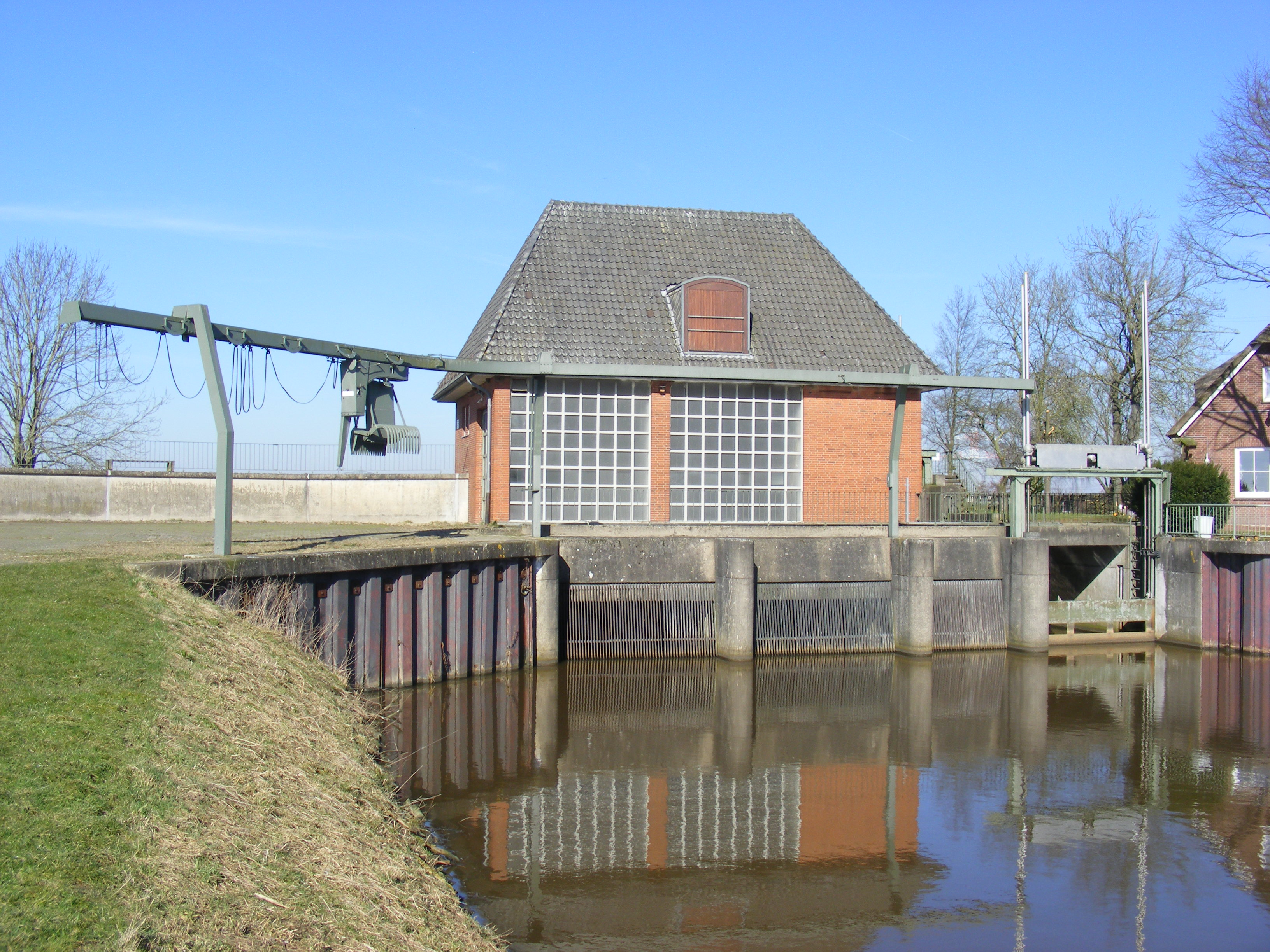 Schöpfwerk Seehausen des bremischen Deichverbandes am linken Weserufer am Ochtumdeich mit dem Sammelbecken des Mühlenhauser Fleets